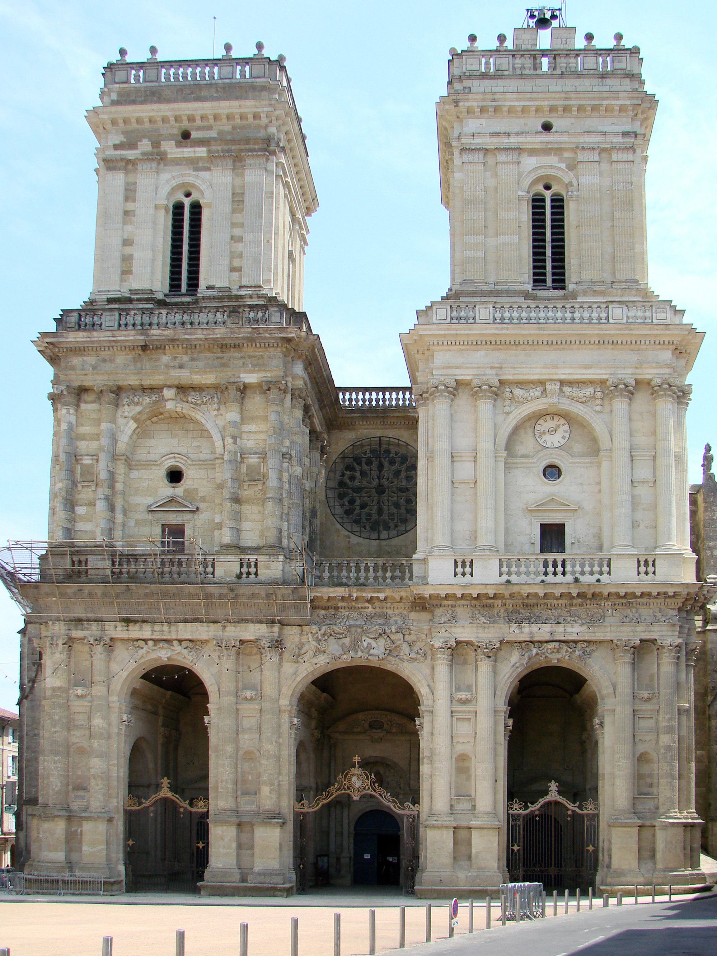 Façade de la cathédrale d'Auch (Gers, France).